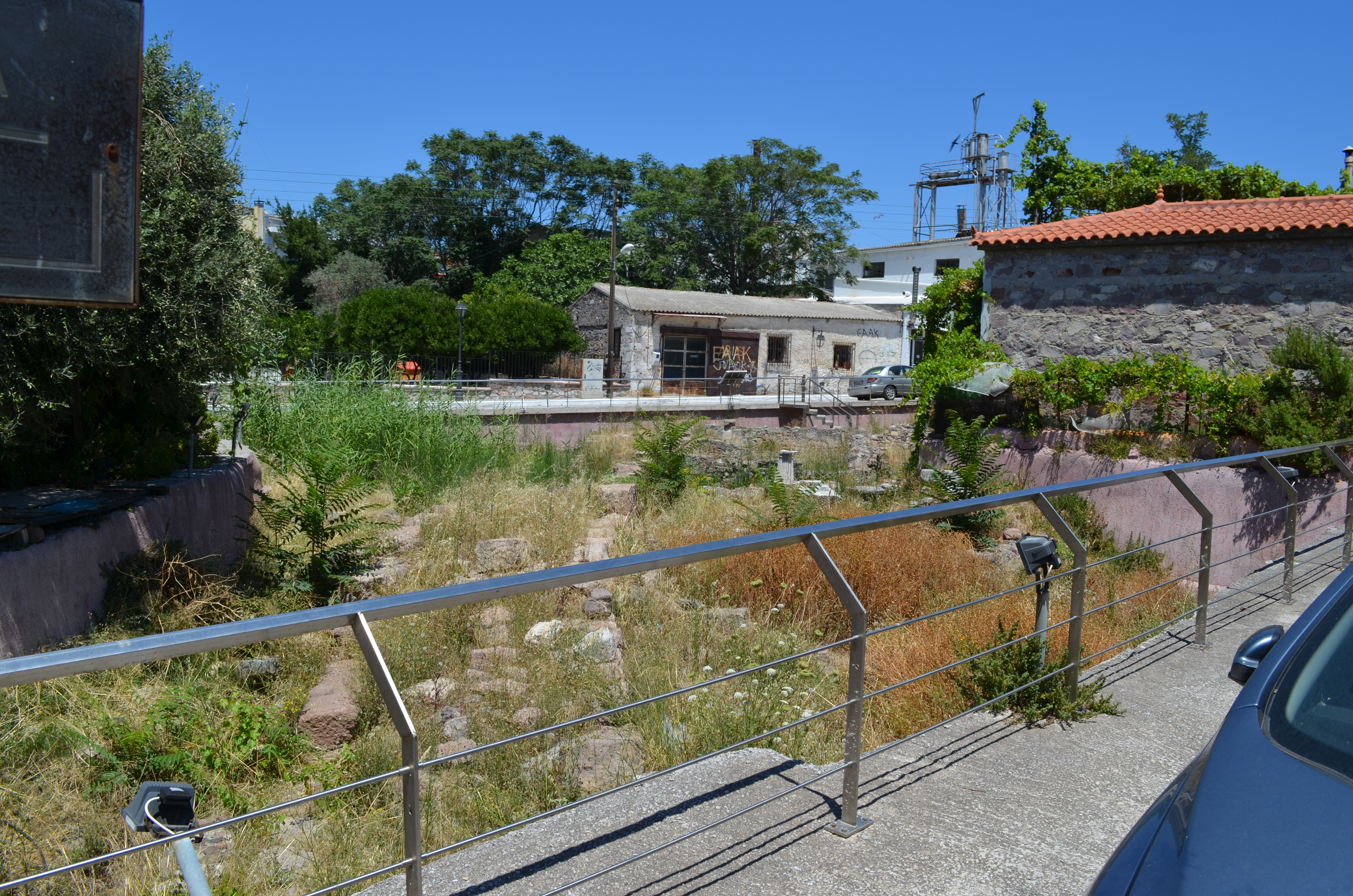 Überreste eines römischen Hauses zwischen den Strassen Dikili und Nikomedia.